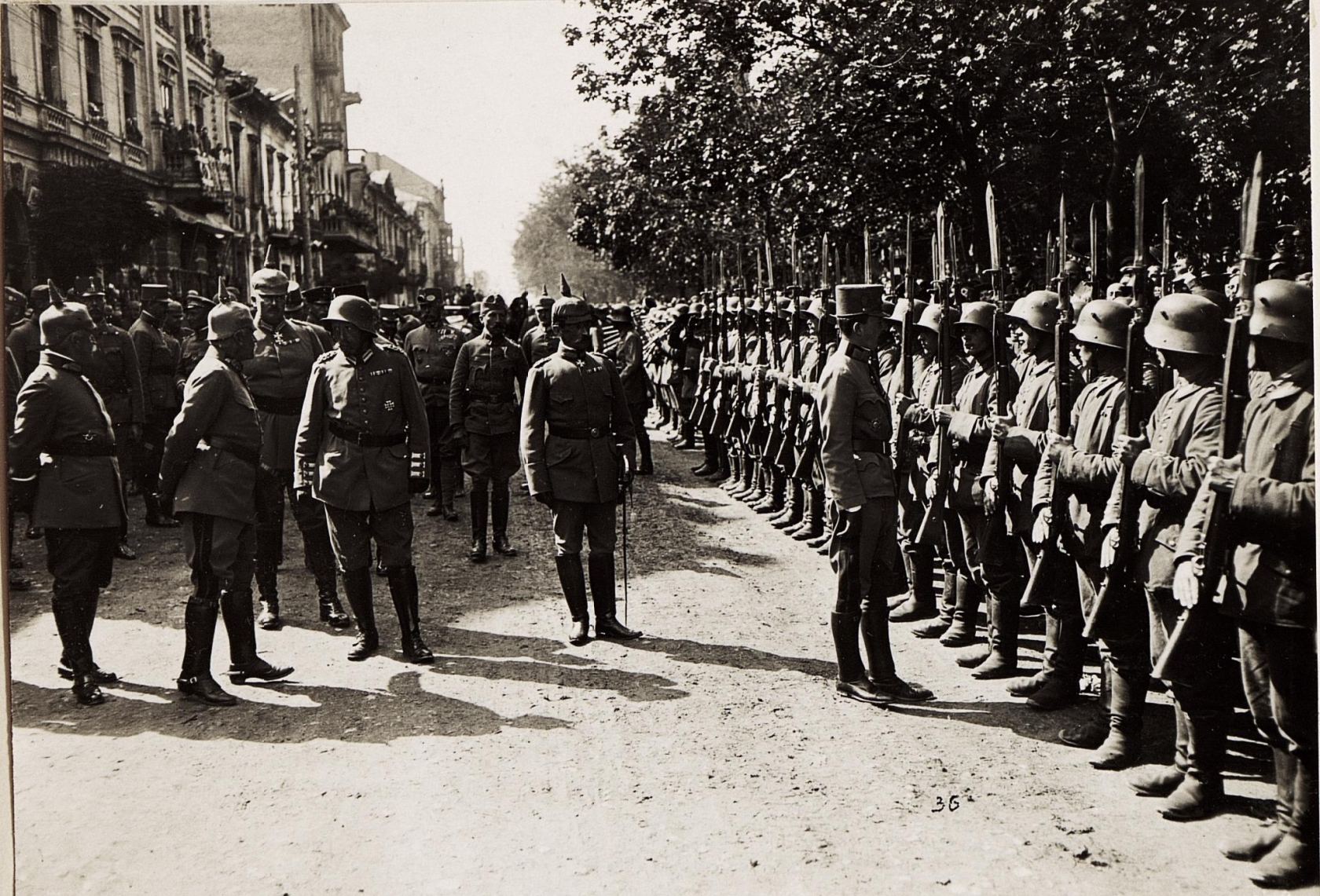 Kaiser Karl I. im rückeroberten Tarnopol am 30.7.1917 unmittelbar nach der erfolgreichen Gegenoffensive